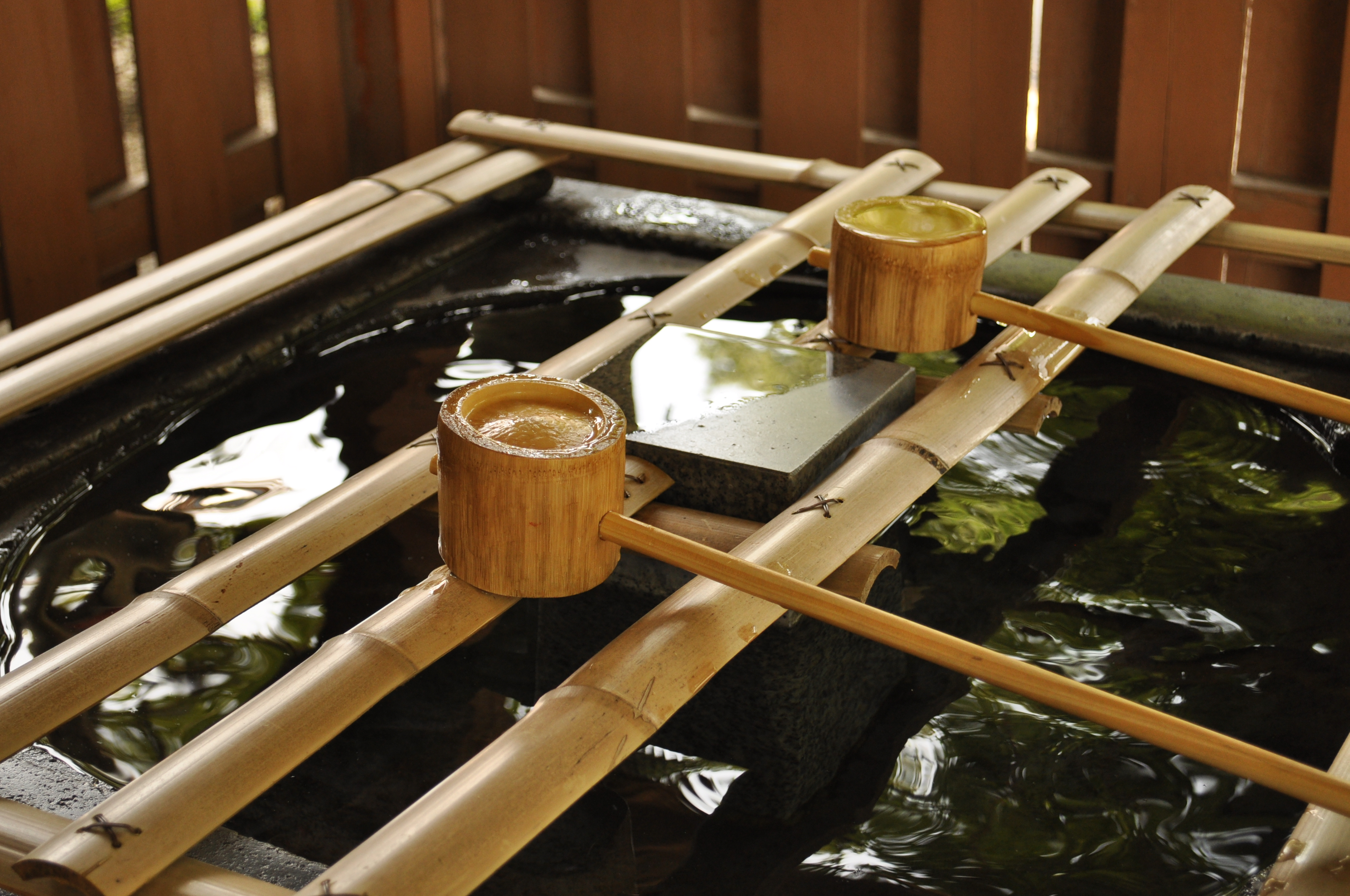 参拝に際して手や口を清めるための施設